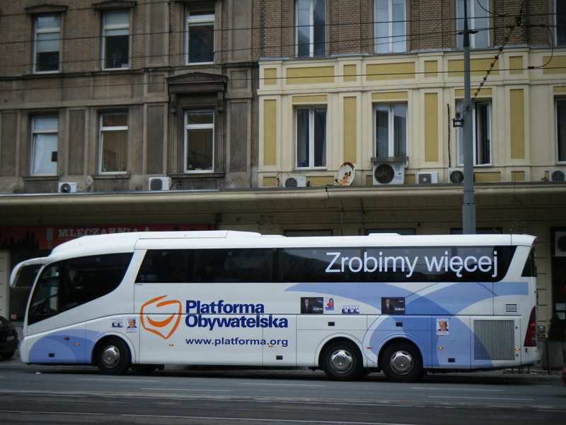 Platformobus w Alejach Jerozolimskich w Warszawie podczas kampanii wyborczej w 2011 roku.